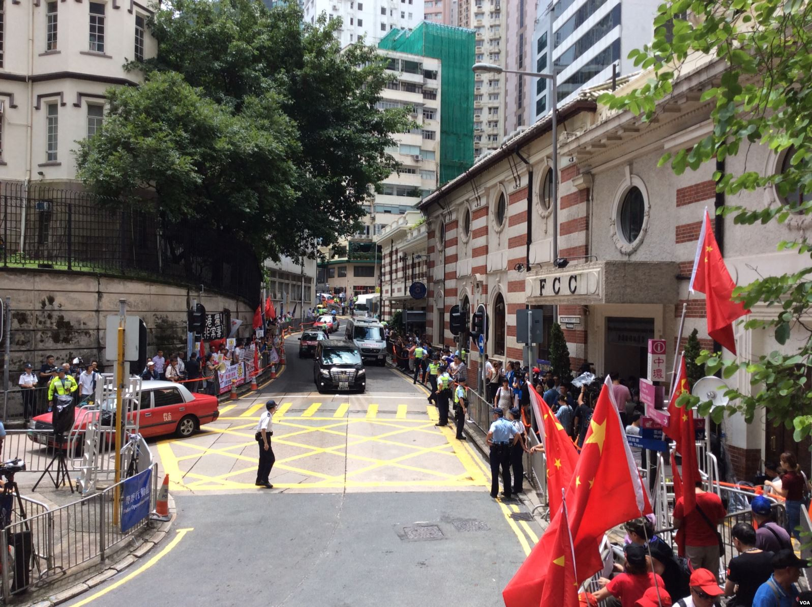 2018年8月14日，陈浩天演讲的香港记者会外面，各类团体聚集发声。